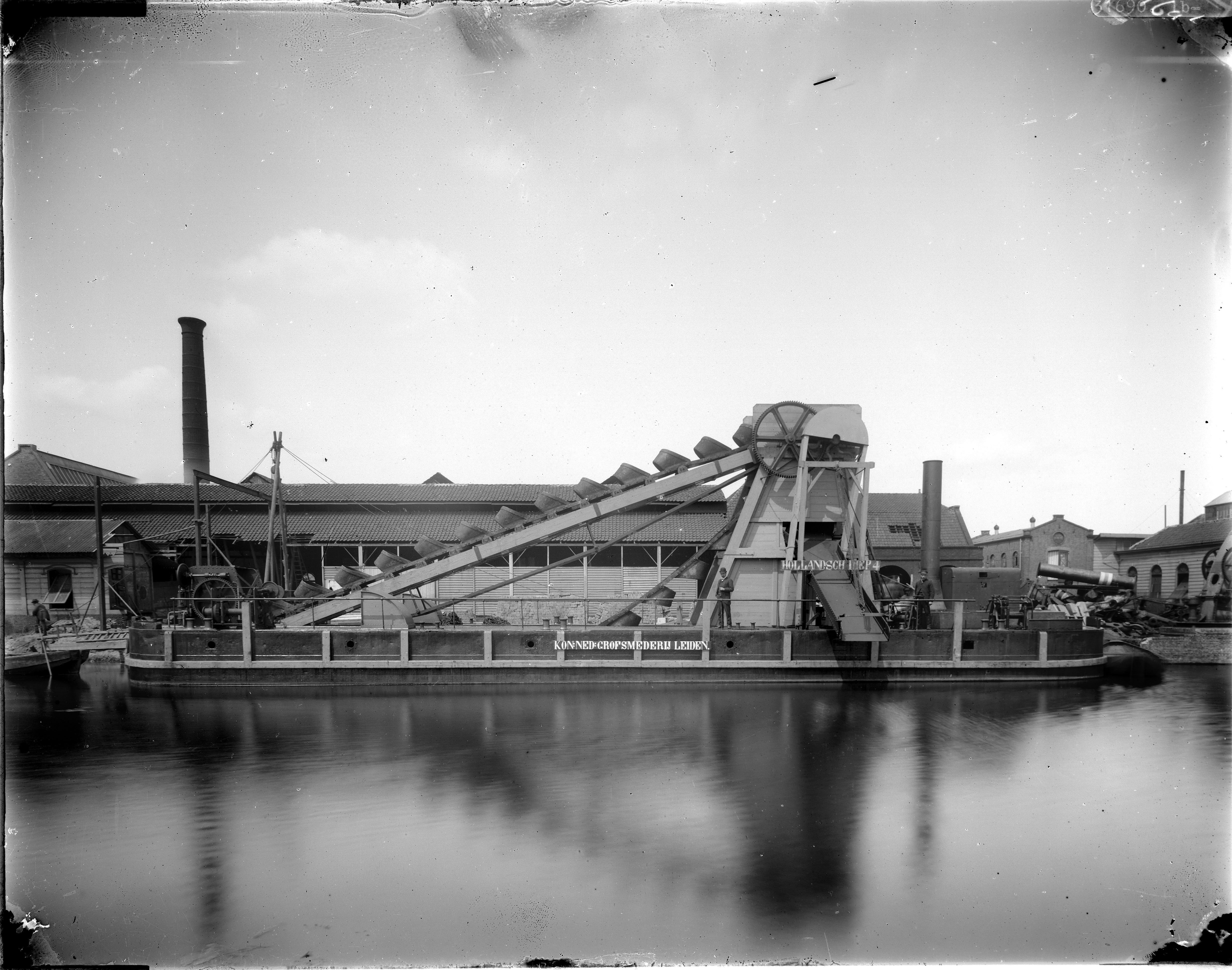 Zuidsingel 66, Koninklijke Nederlandse Grofsmederij. Baggervaartuig voor de wal van het fabrieksterrein gezien vanaf de Zijlsingel.